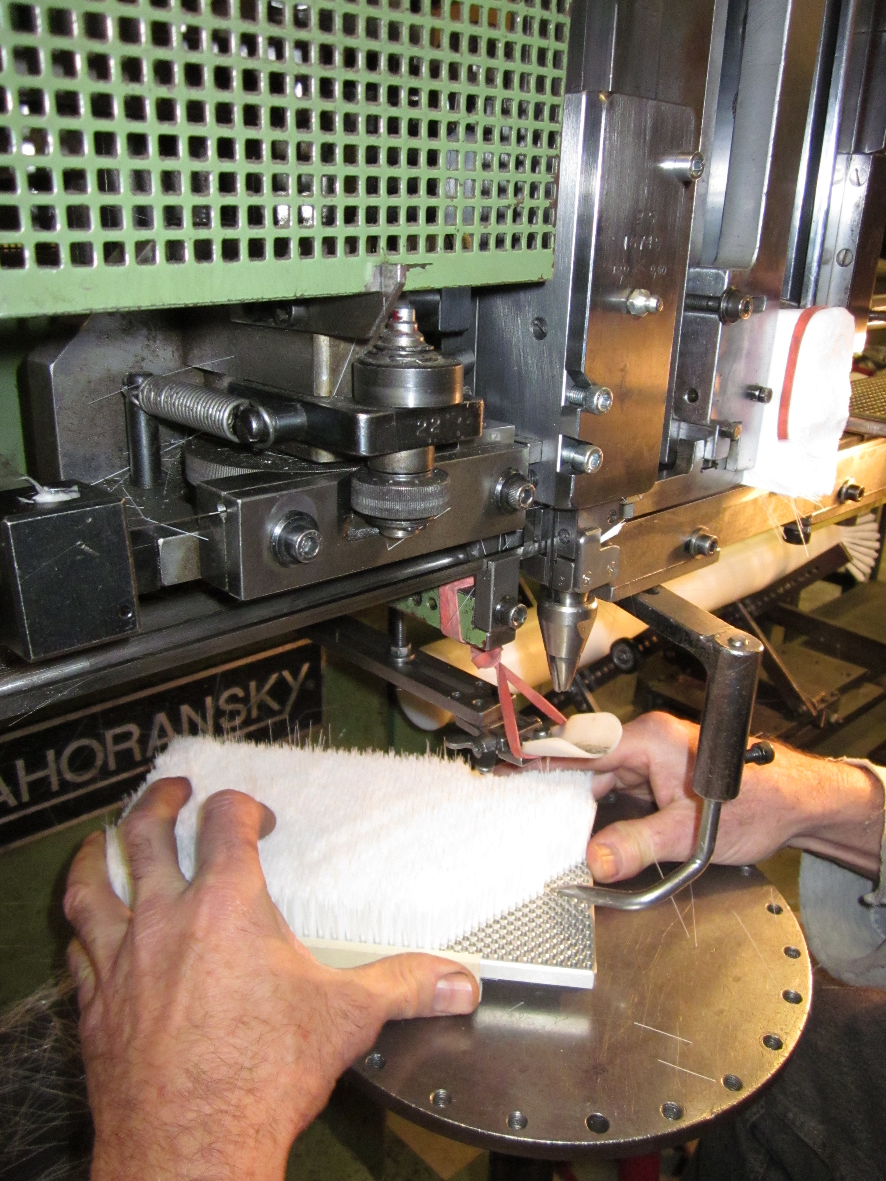 Empoilage d'une brosse à la machine dite machine à présenter